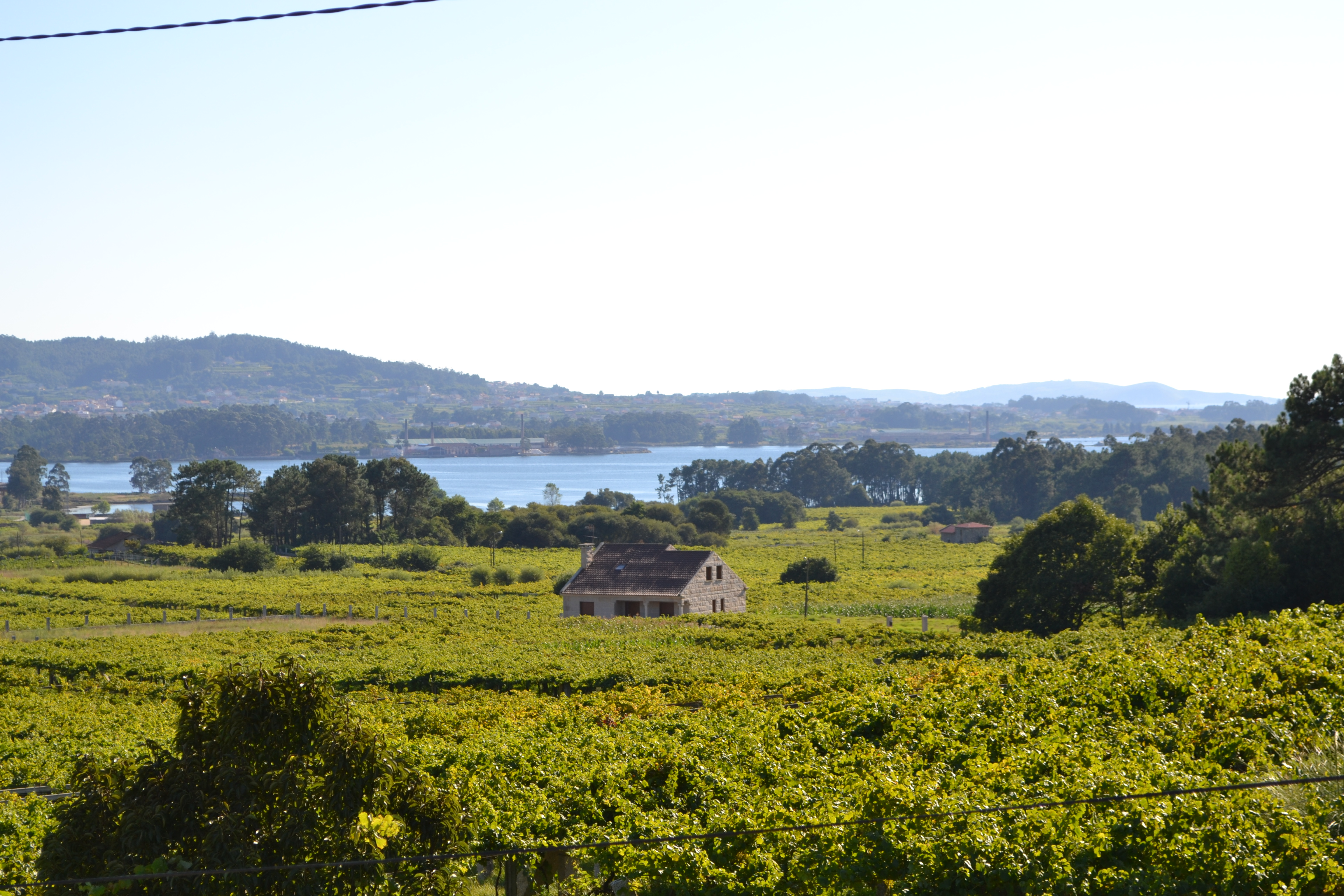 Viñedos de albariño en la parroquia de la Santa Cruz de Castrelo (Cambados).